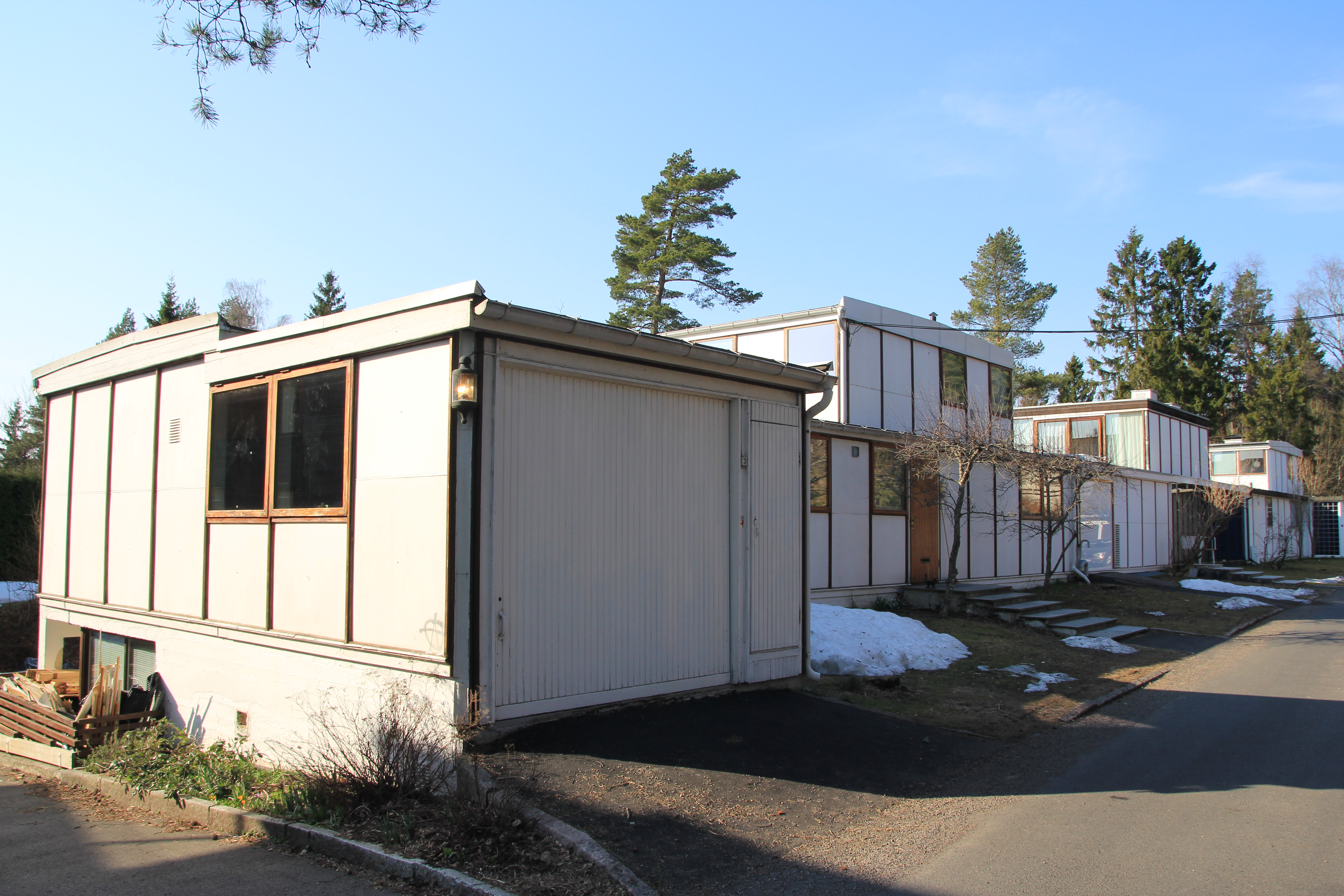 Planetveien 10 A, 12 og 14 ble oppført på 1950-tallet på Vettakollen i Oslo. Bygningene er tegnet av arkitektene Arne Korsmo og Christian Norberg-Schulz.